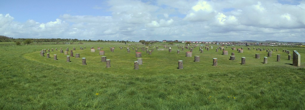 kleur iets aangepast